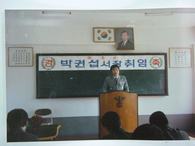 경상남도 소방 역사사진